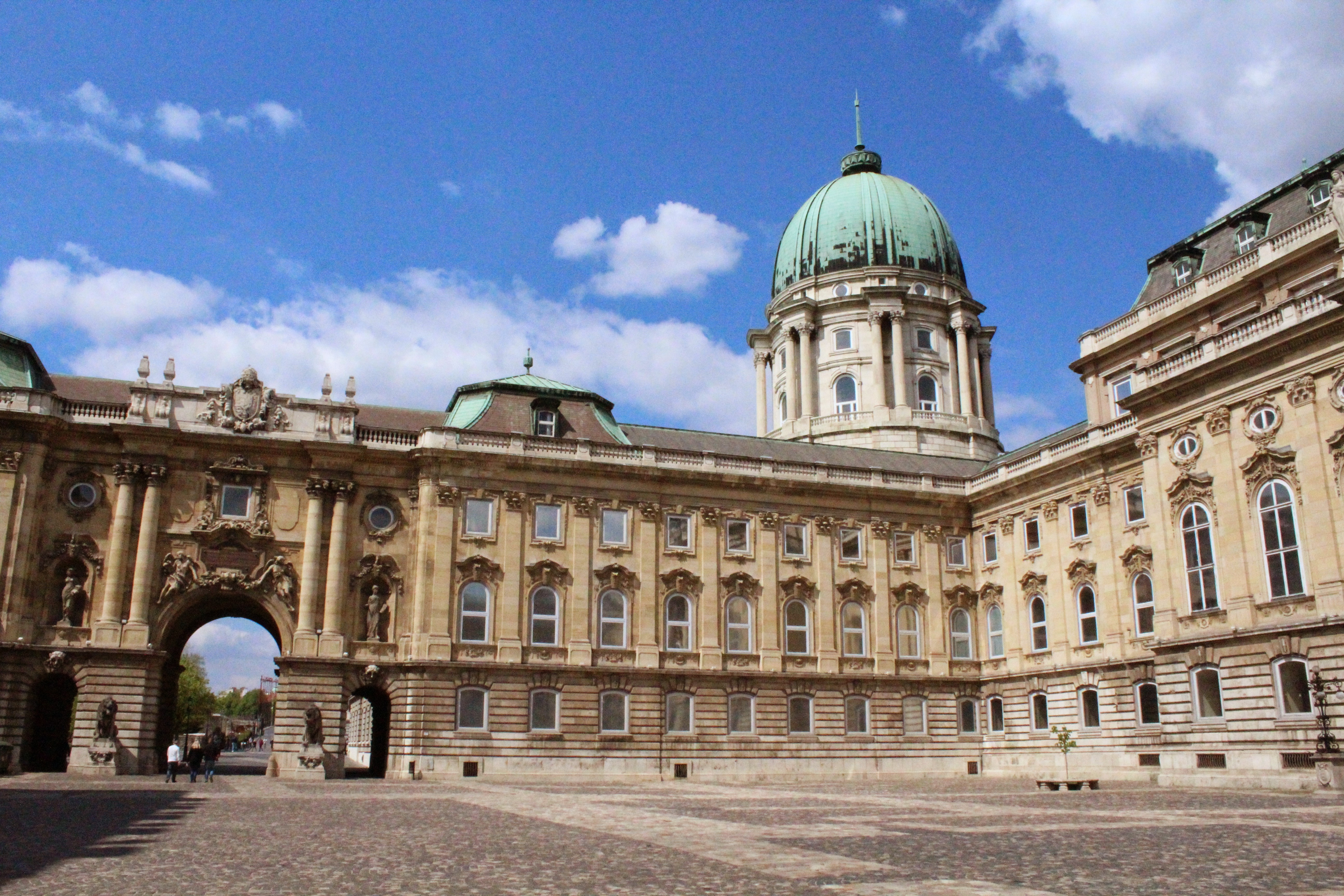 Budapest, Hungría